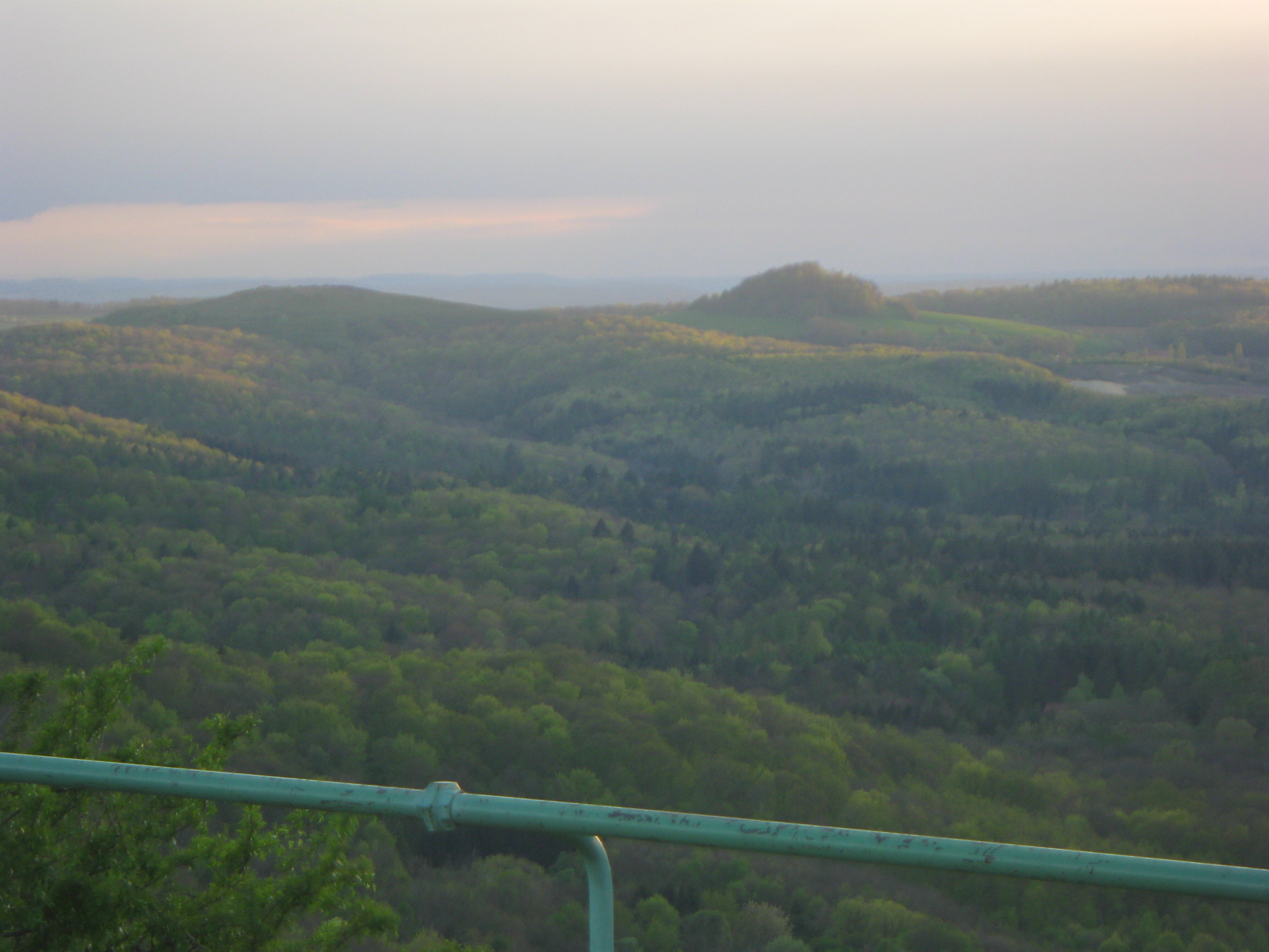 Blick vom Georgenberg über den Wasenwald zum Käpfle